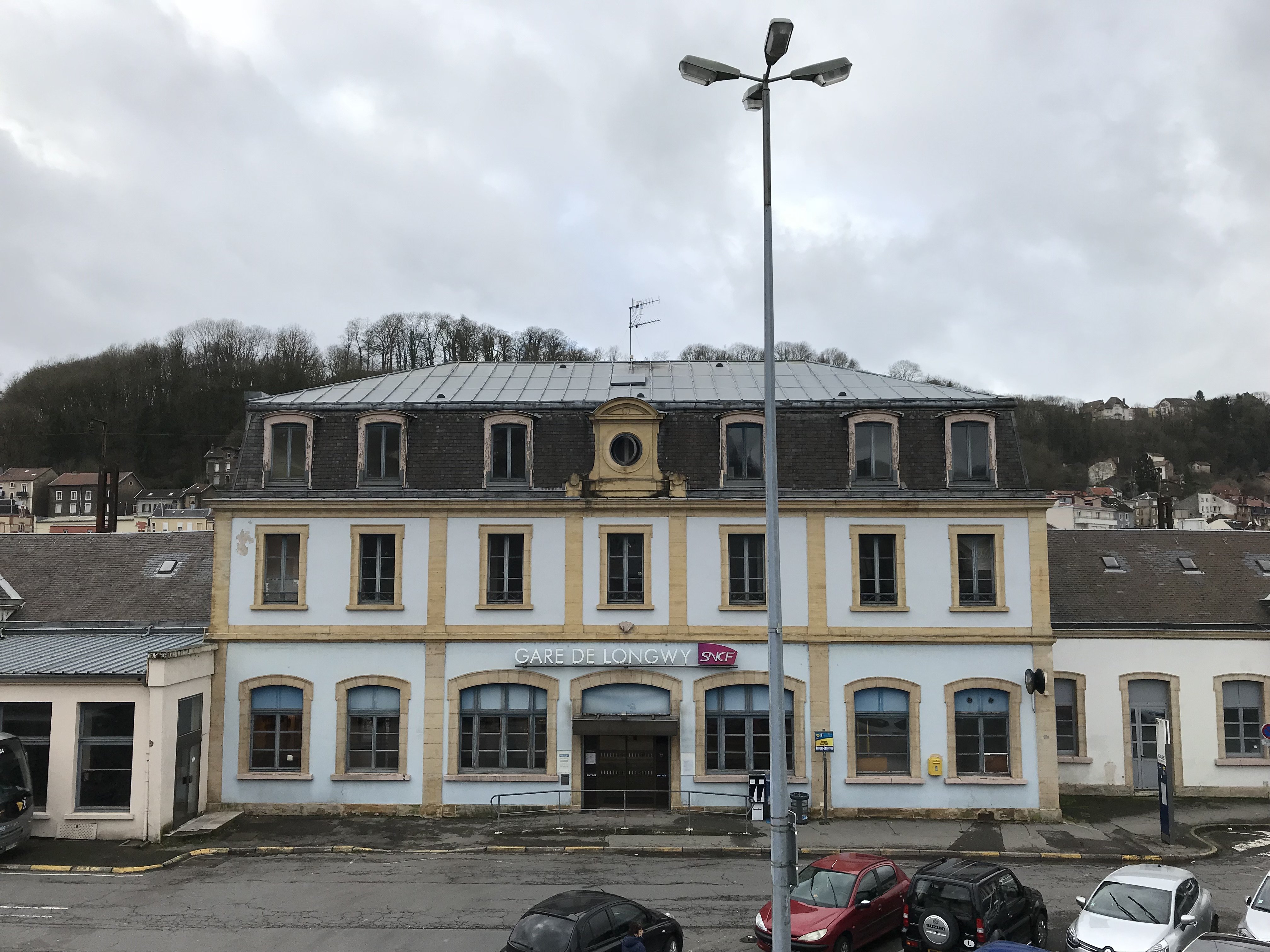 Gare de Longwy